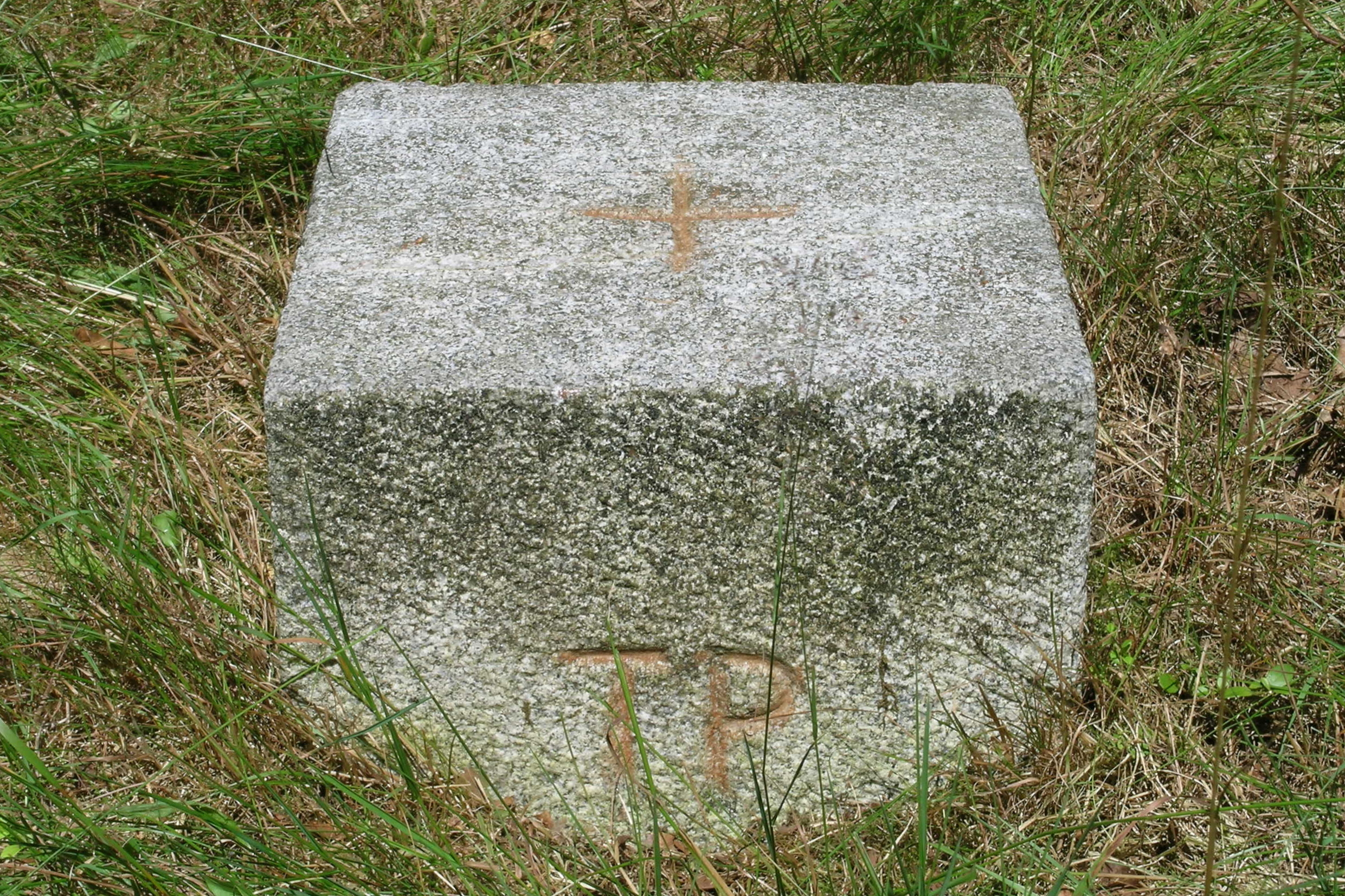 Der historische Gauß–Stein auf dem Haußelberg